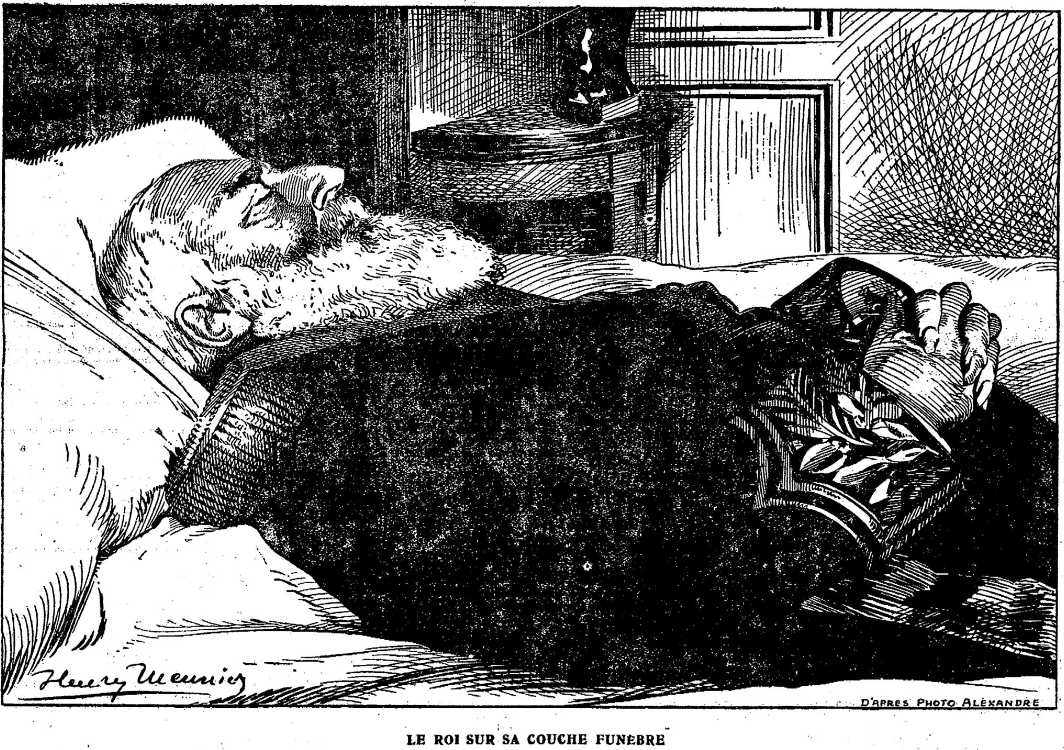 Le Roi Léopold II sur sa couche funèbre (Le Soir, 19/12/1909)